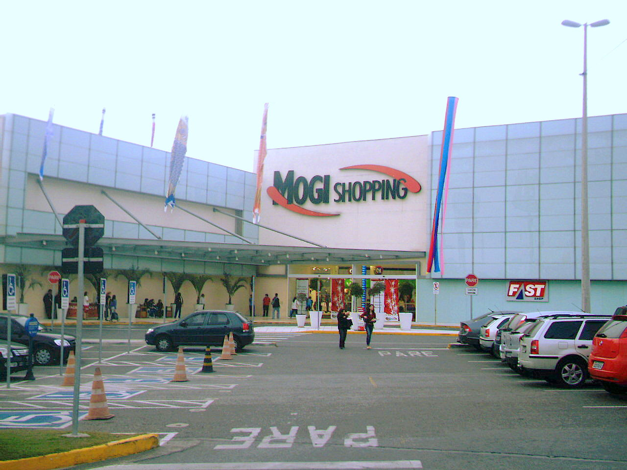 Mogi Shopping